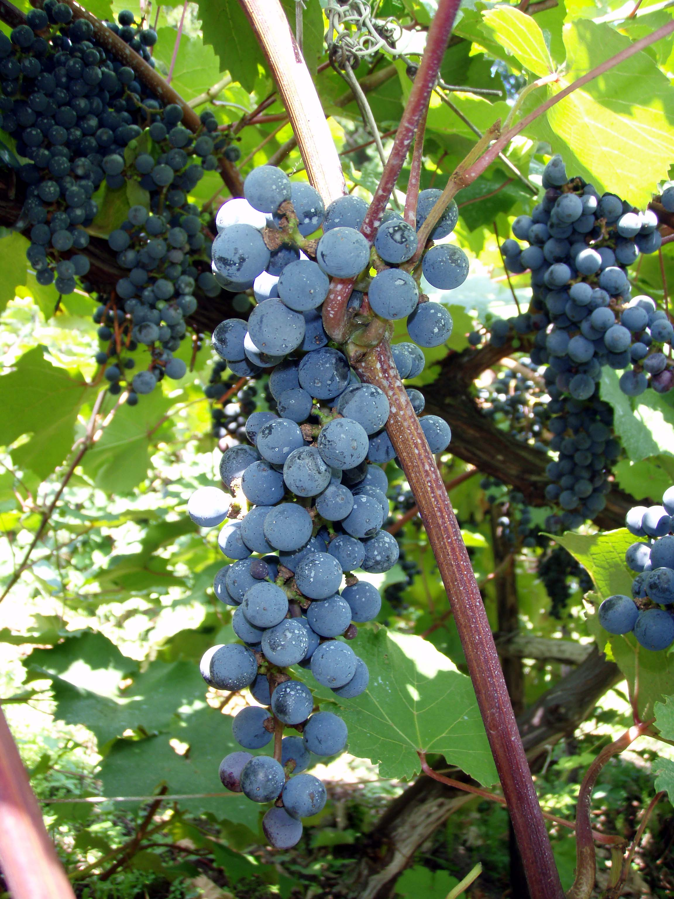 ヤマ・ソービニオン種 (ワイン用品種)